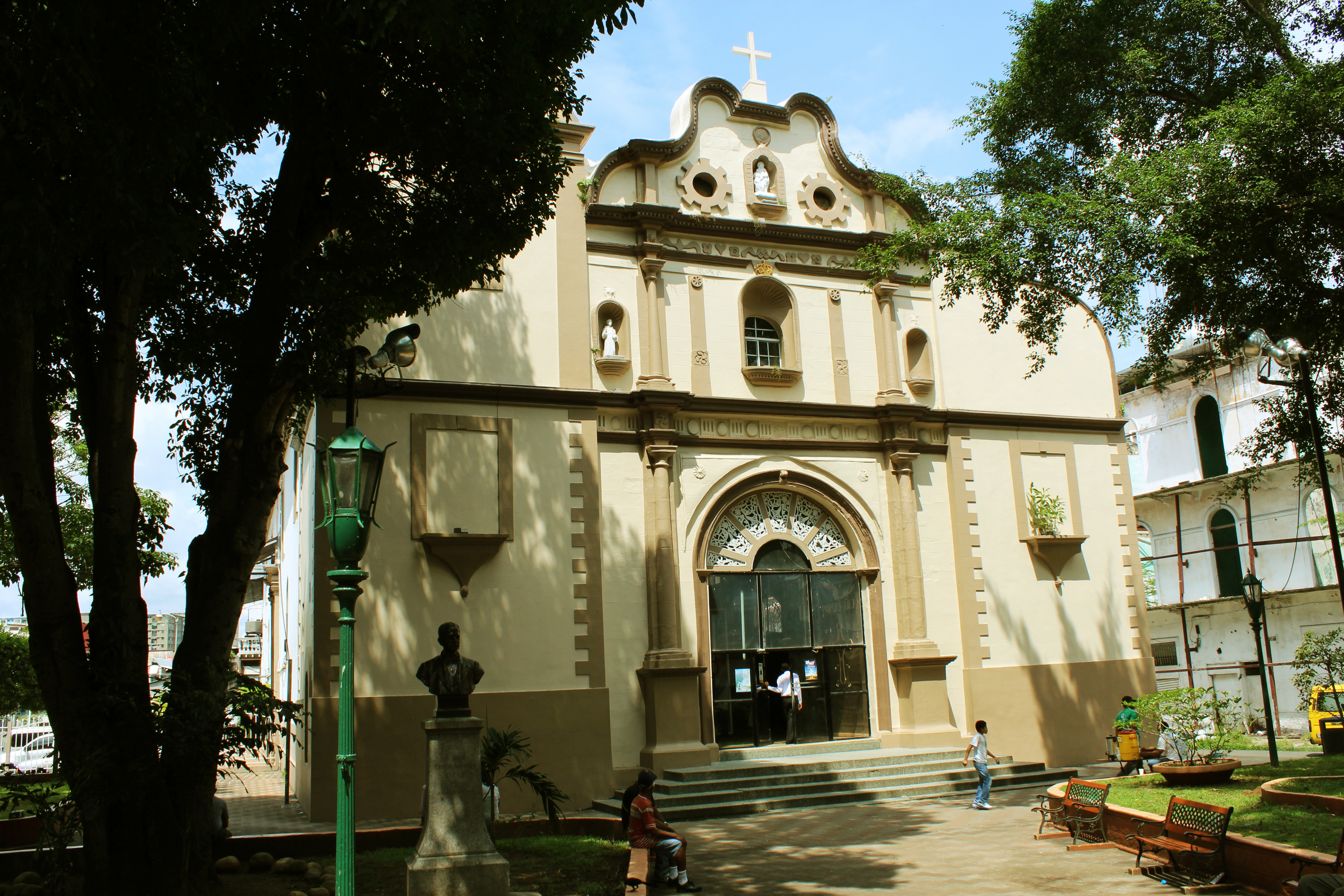 a esta fotografia se le aplico brillo y contraste.